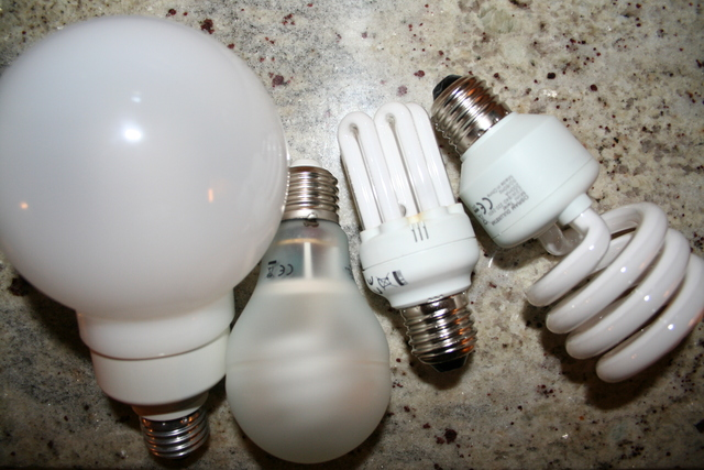 Varčne sijalke različnih oblik.